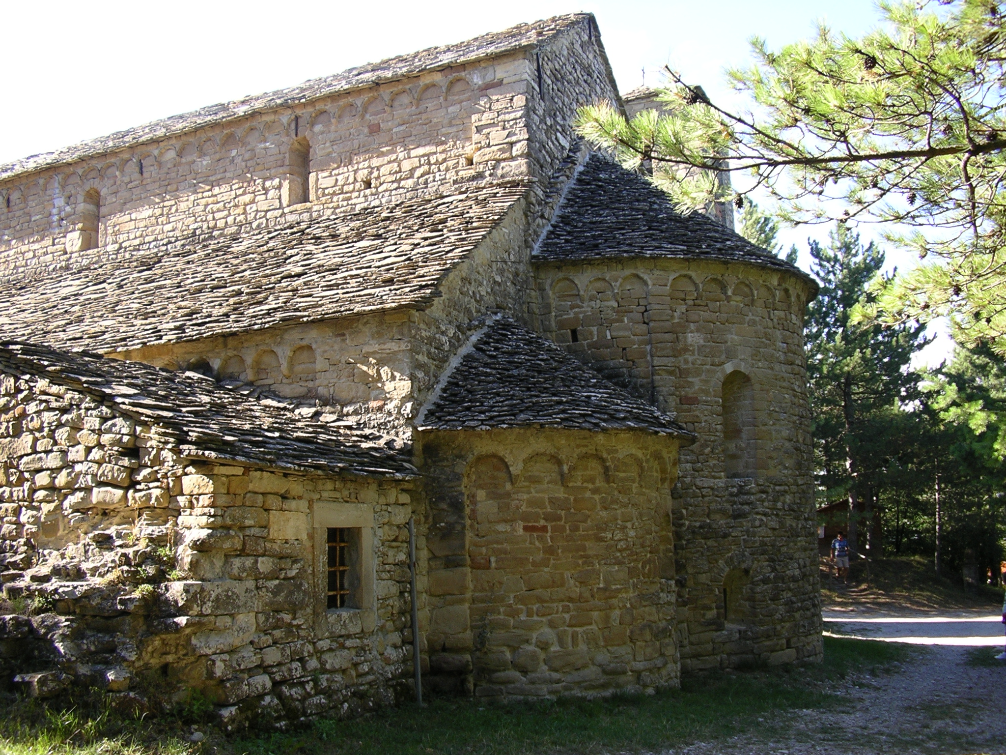 Vista esterna dell'abside della Pieve di Sasso - Neviano degli Arduini (PR)